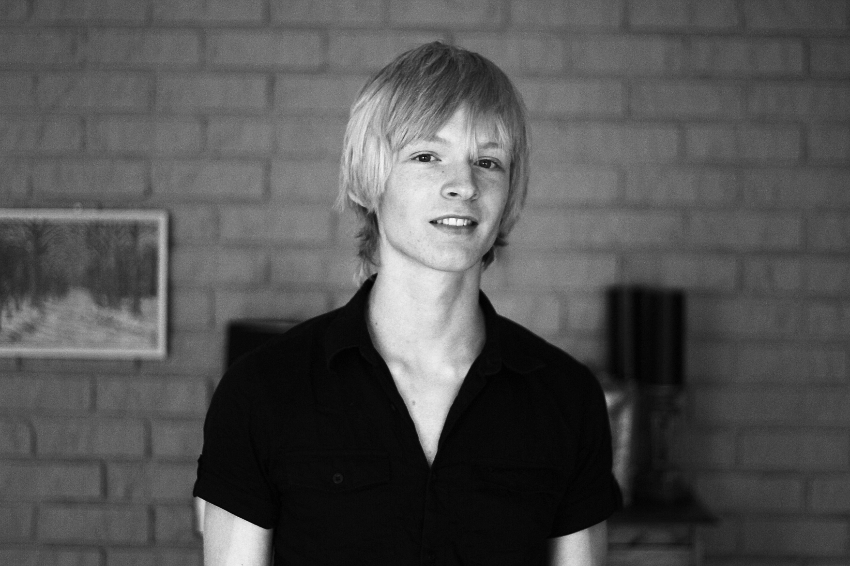 Nederlands acteur